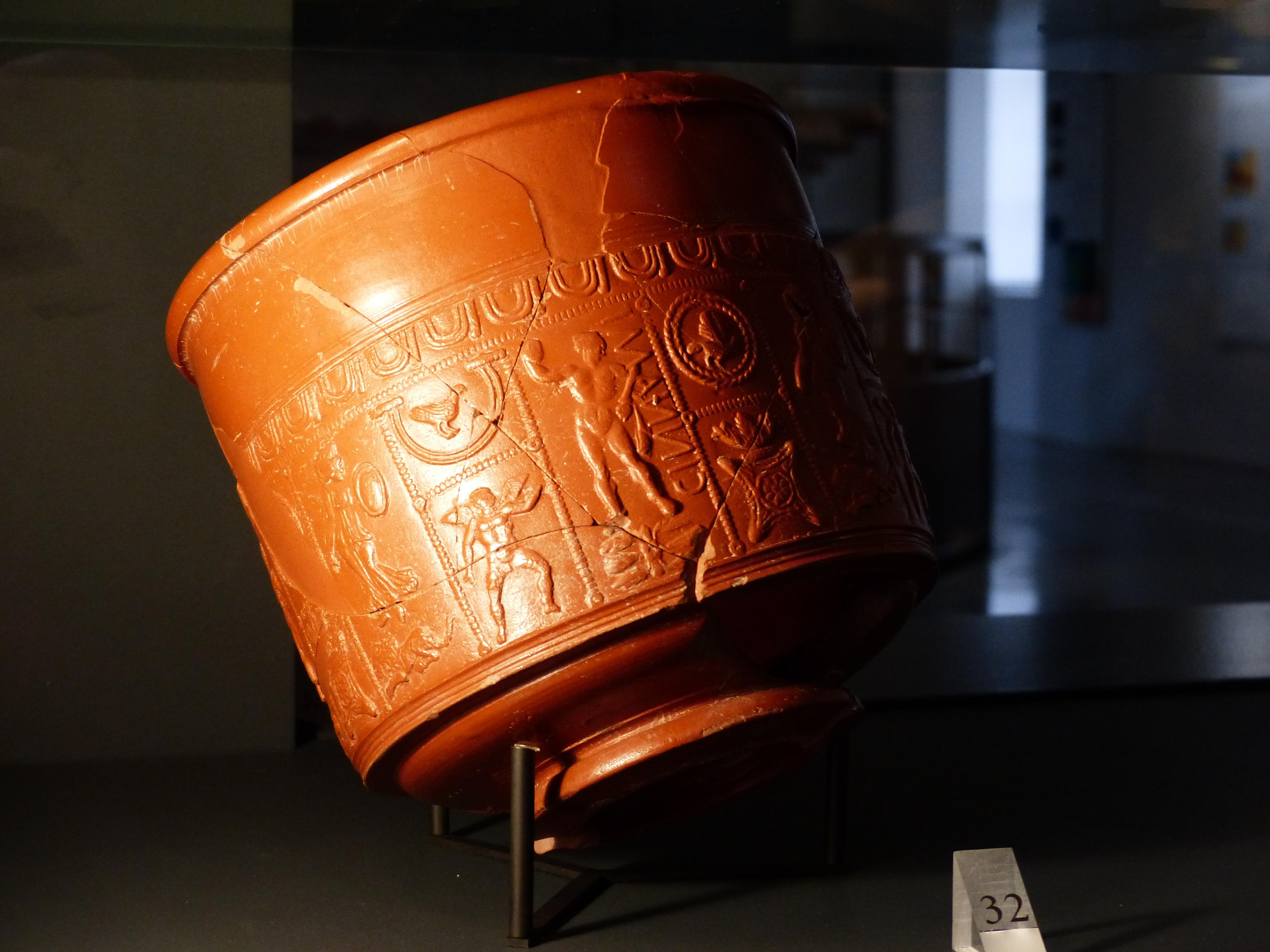 Musée de la Céramique de Lezoux (Puy-de-Dôme). Coupe de céramique sigillée gallo-romaine de Lezoux. Forme Drag 30. Marque de potier : CINNAMI